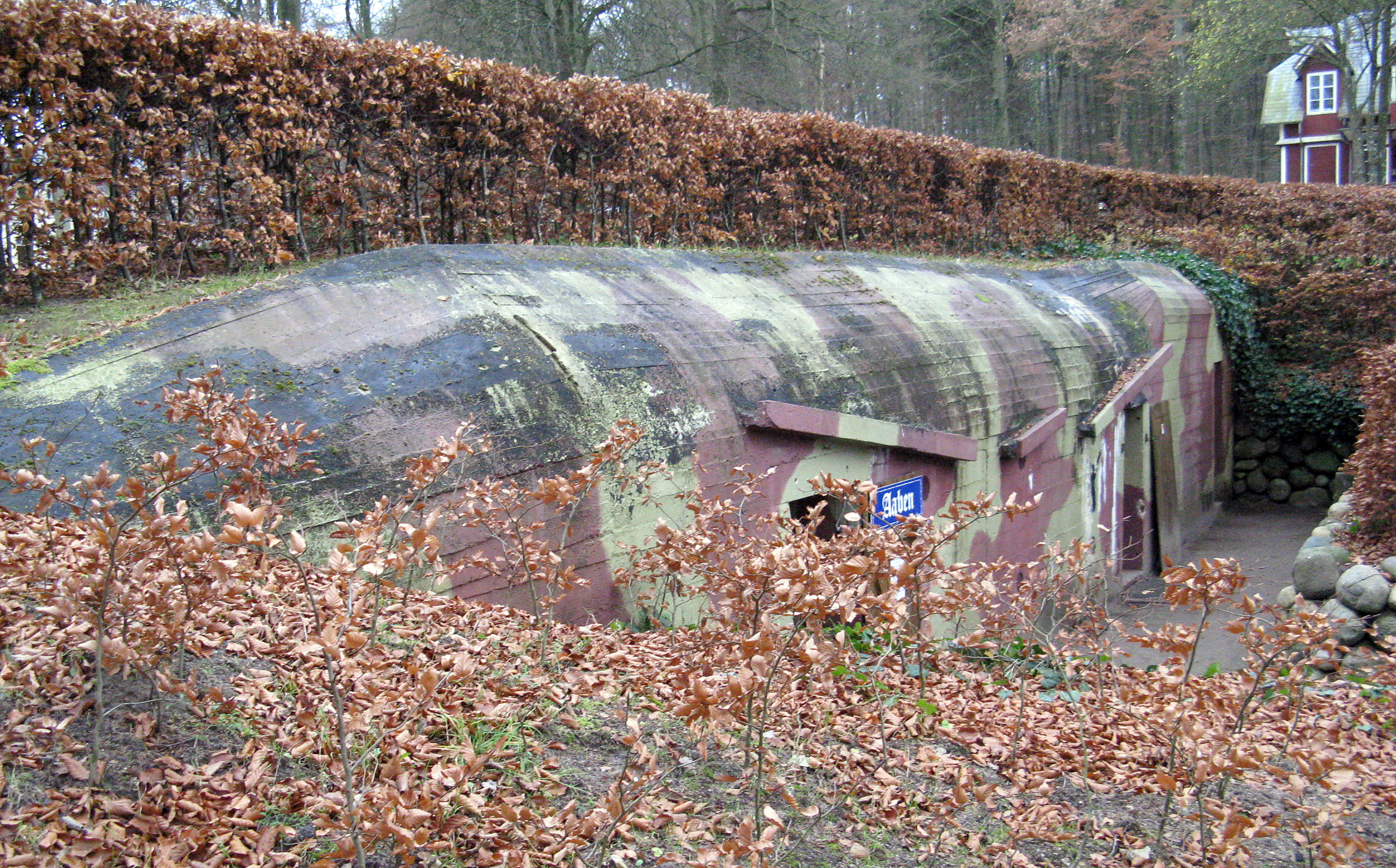 Silkeborg Bunker Museum ligger ved Silkeborg Bad, ved Ørnsø i den sydvestlige ende af Silkeborg